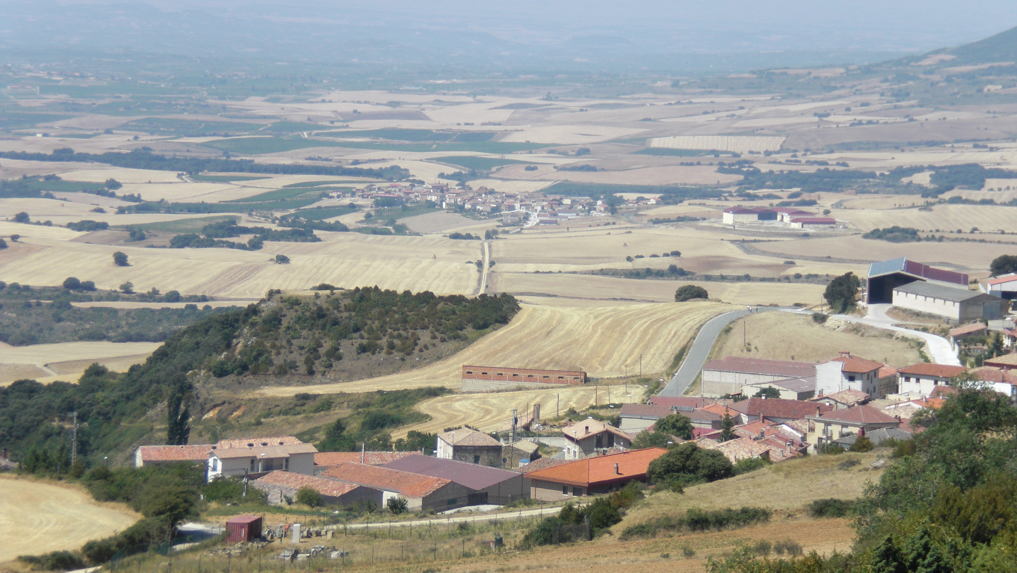 Meano (aurrean) eta Kripan (atzean).